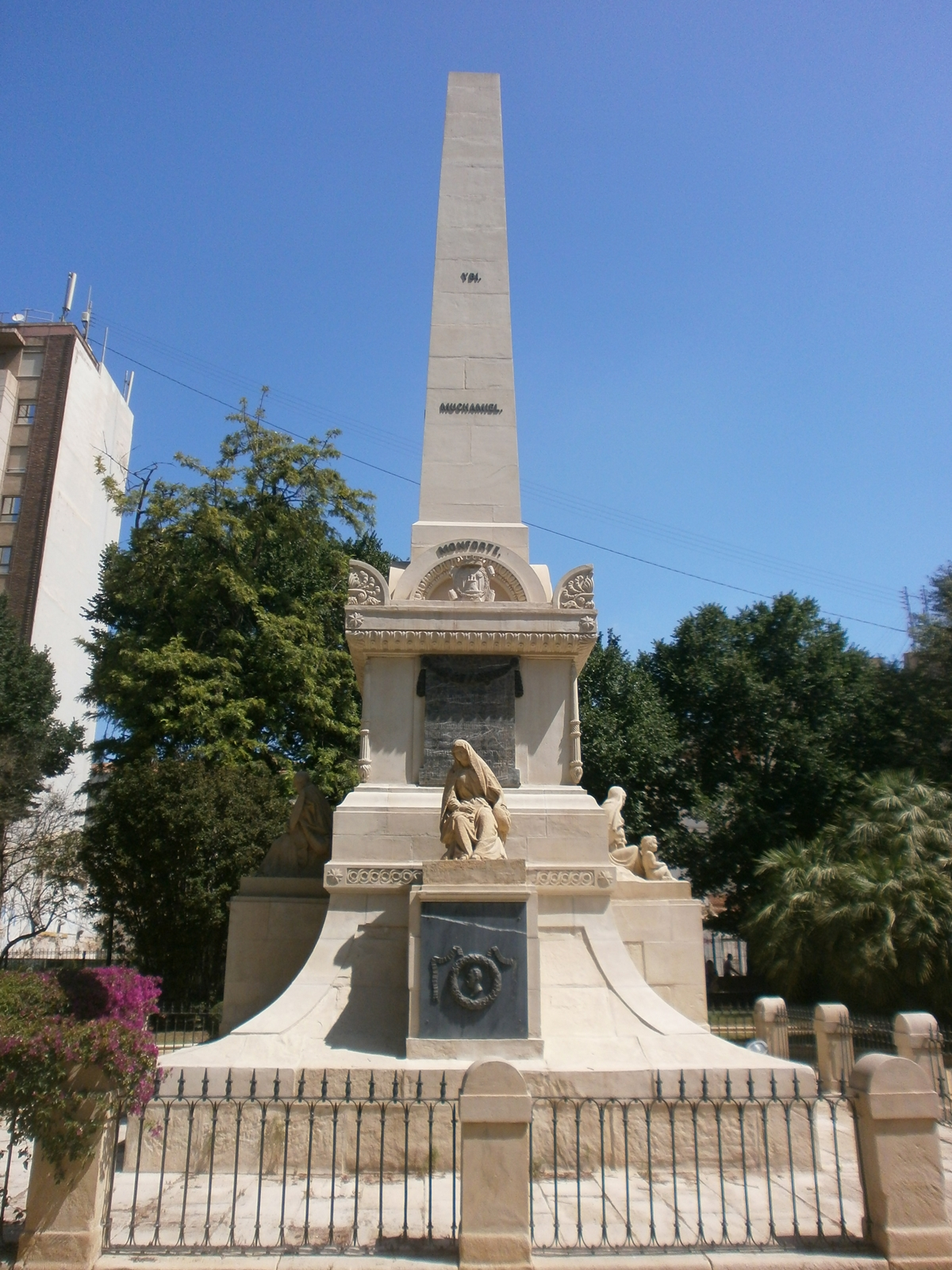 Panteón de Quijano, Alicante, España.